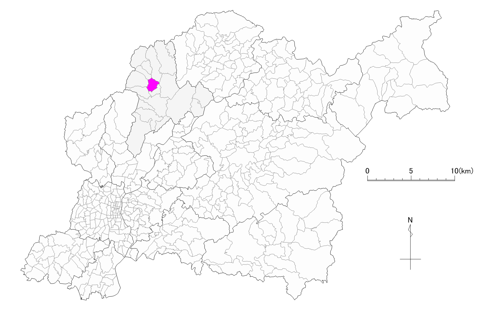 豊田市上渡合町位置図